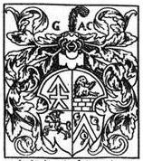 Родавыя гербы XVI i XVII стст. Віленская школа.